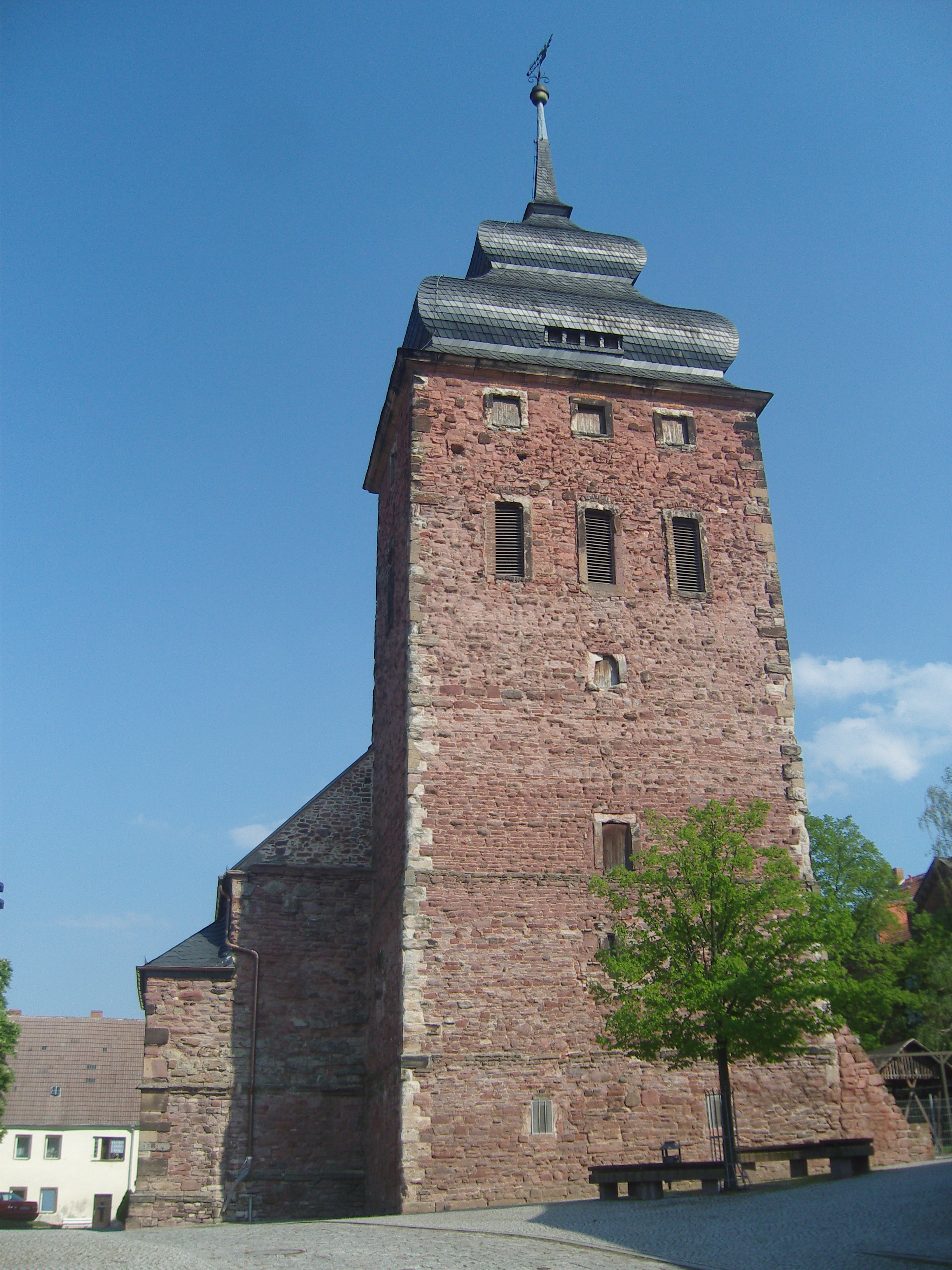 Kirche St. Wenzel (Könnern)